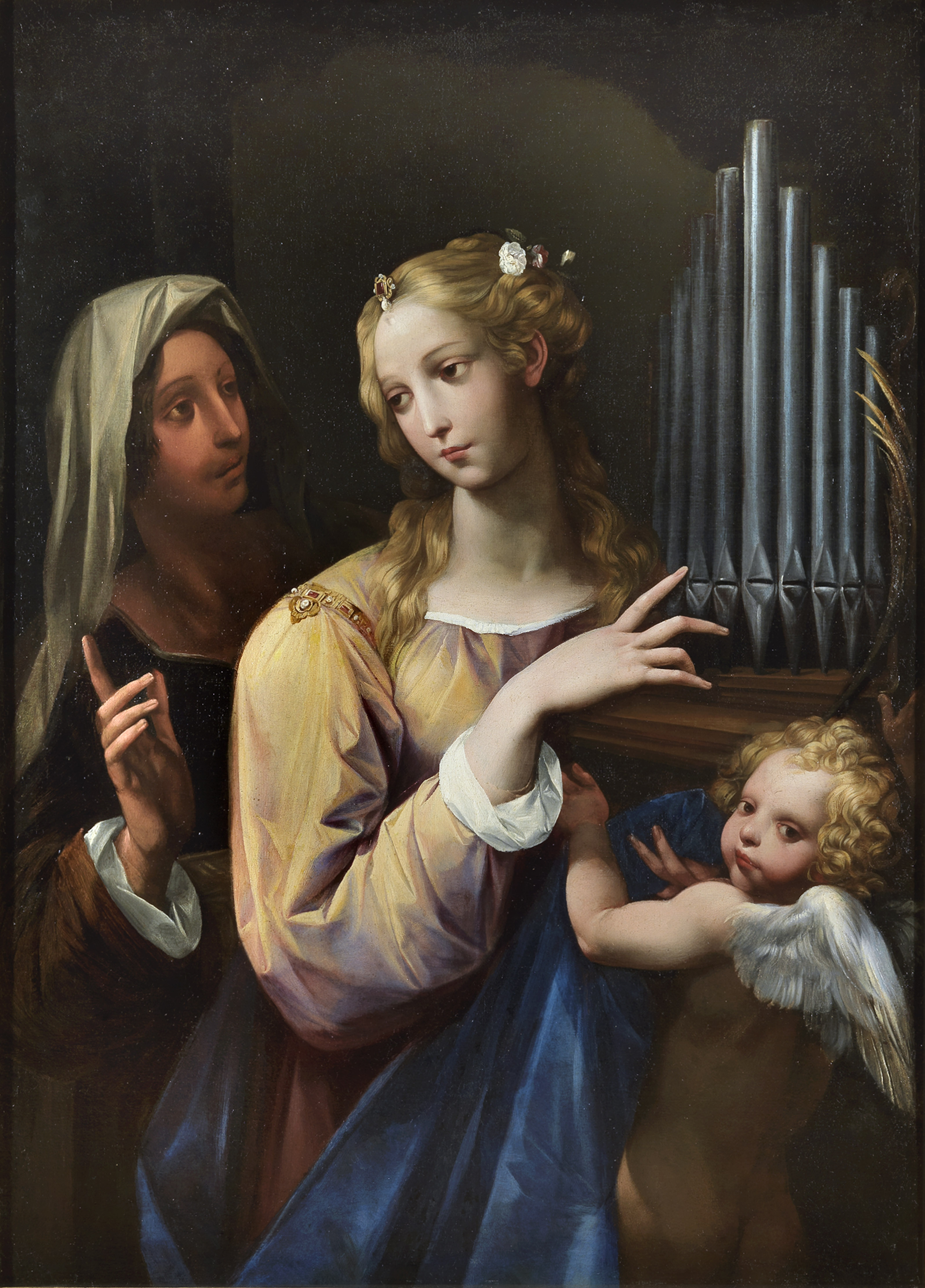 Santa Cecilia con l’organo portatile, un’altra santa e un putto Olio su tela 136x98,5 cm